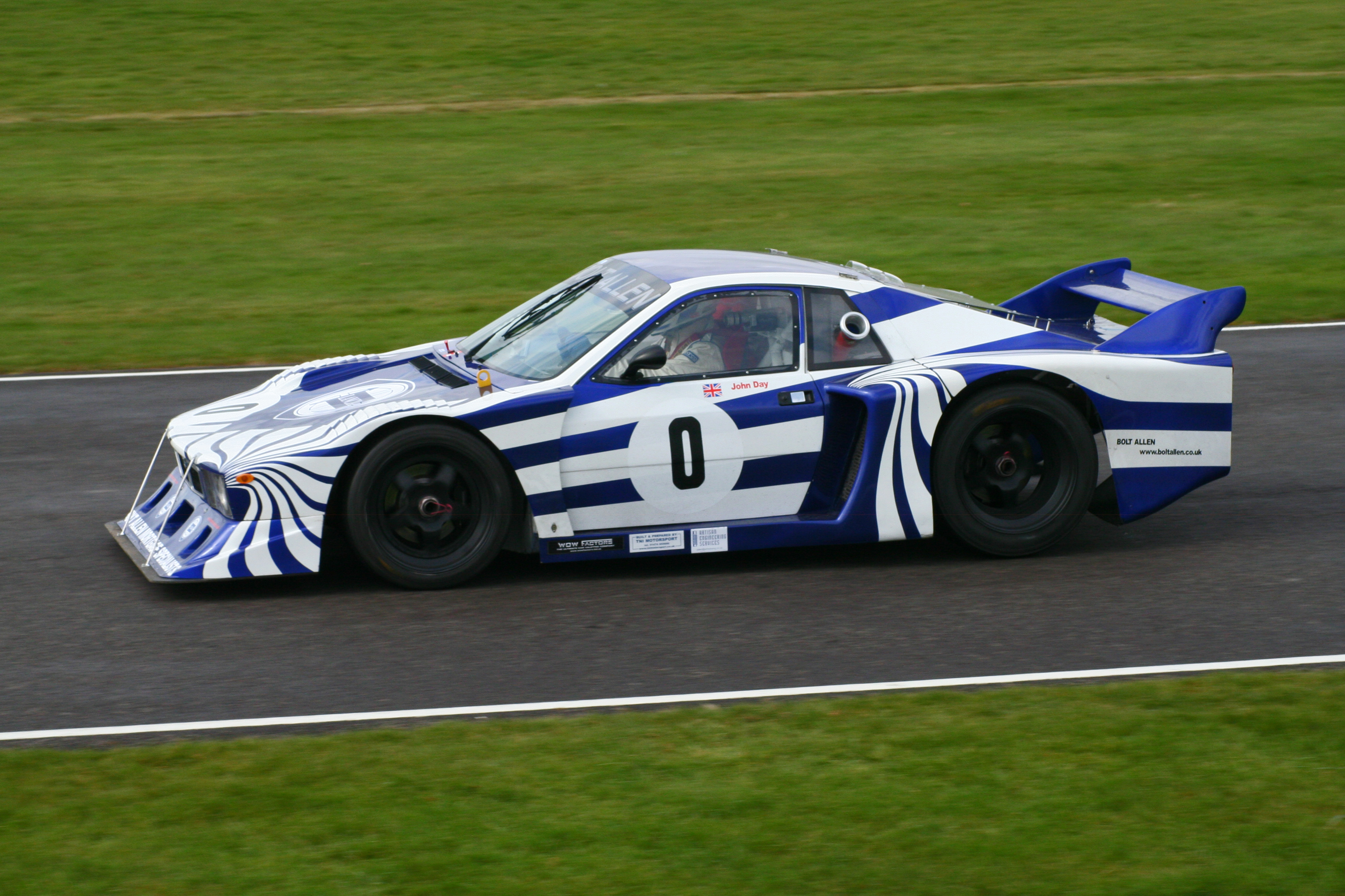 A Group 5 Lancia Beta Montecarlo